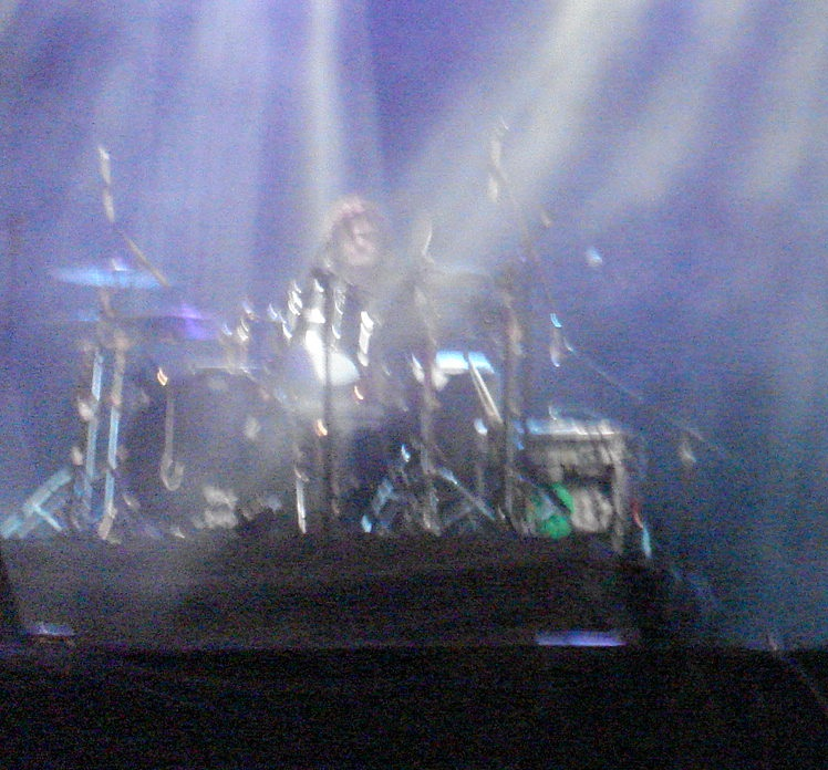 Daniel Piccolo en 2008.